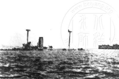 Фото затопленного крейсера "Чингъюань"